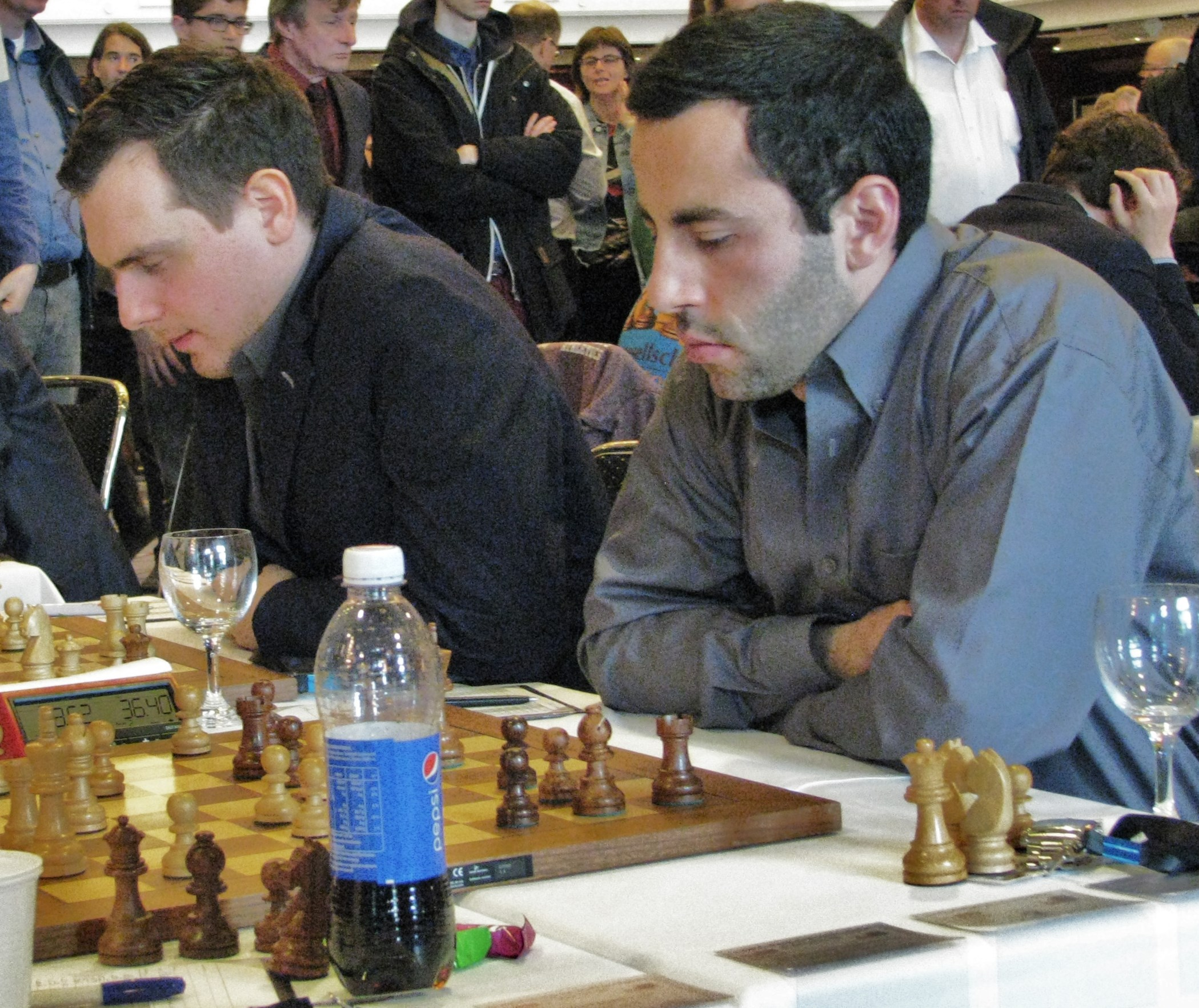 Kacper Piorun und Hrant Melkumjan bei der Bundesliga-Finalrunde 2017 in Berlin